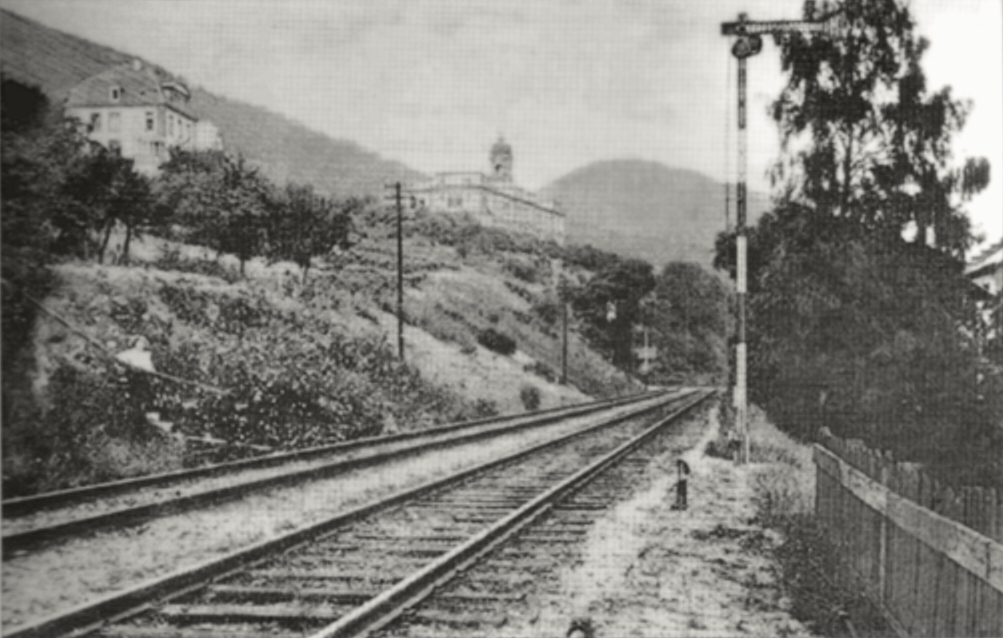 Verlauf der Pfälzischen Ludwigsbahn innerhalb von Neustadt um 1900